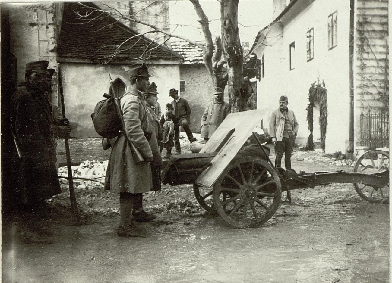 8 cm Gebirgsgeschütz in Mauthen